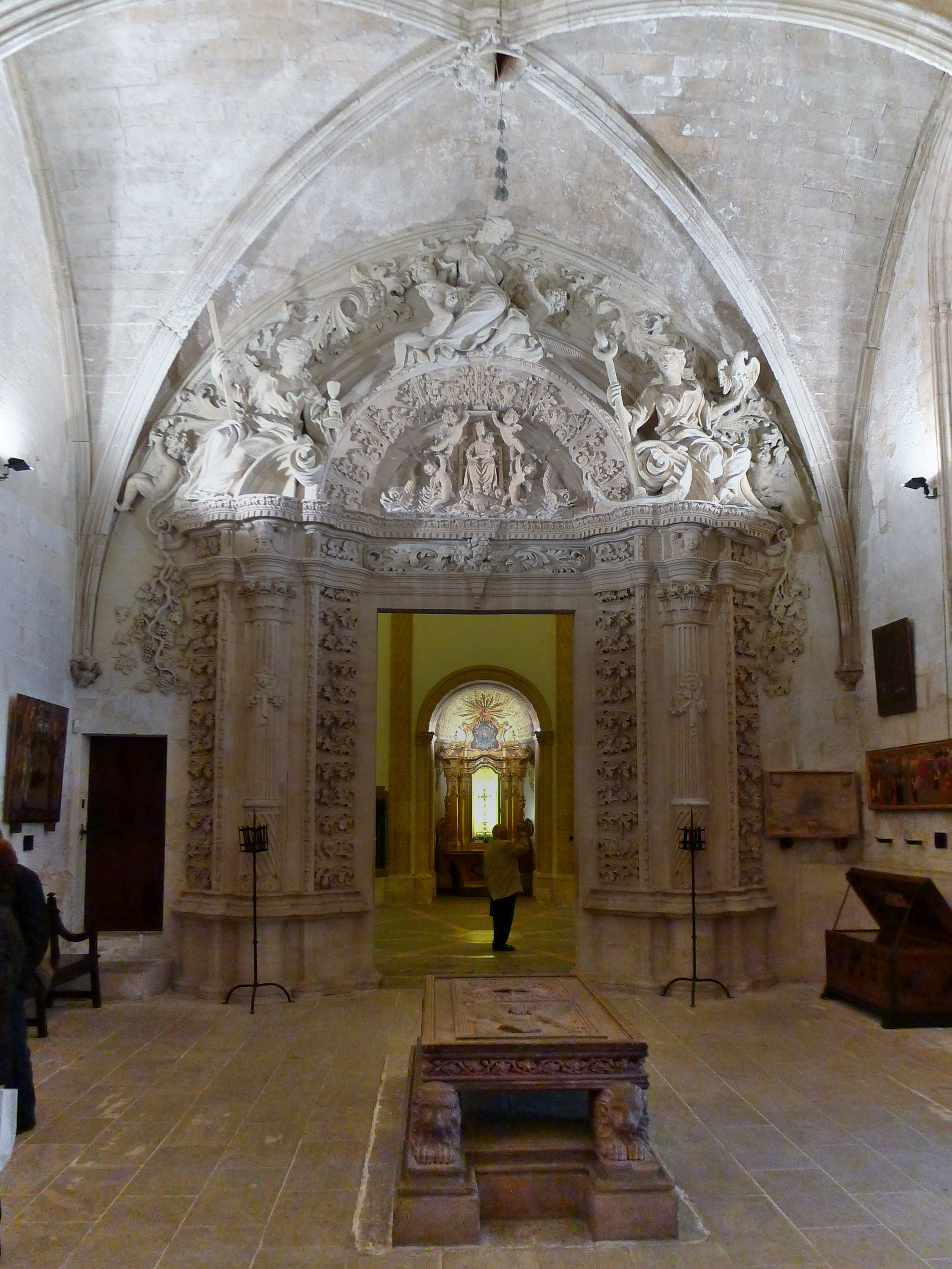 Portada de la sala capitular (1696-1701) proyectada por Francisco de Herrera.